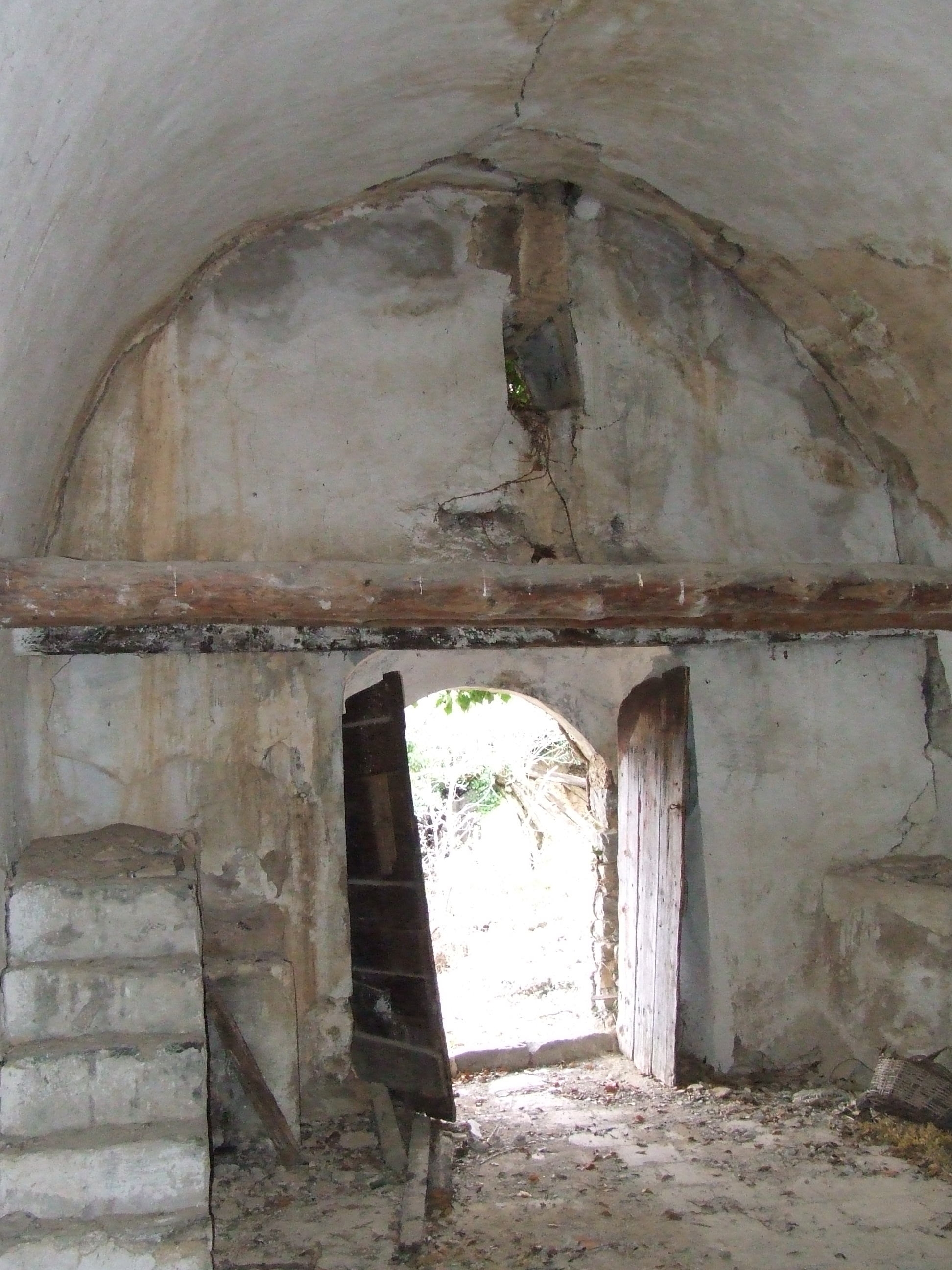 Sant Miquel d'Herba-savina (Hortoneda de la Conca, Conca de Dalt, Pallars Jussà)